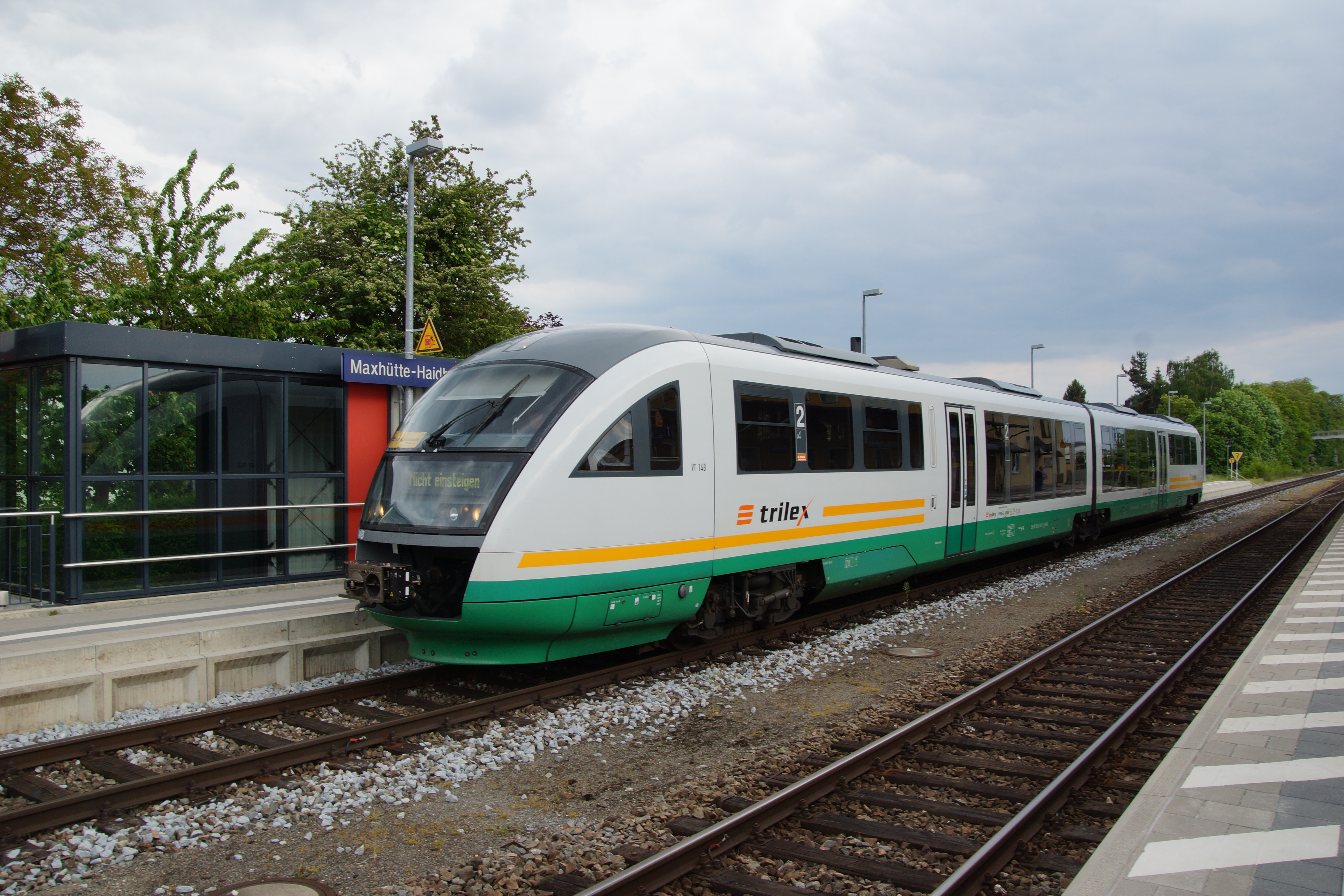 Der Bahnhof in der Oberpfälzer Stadt Maxhütte-Haidhof